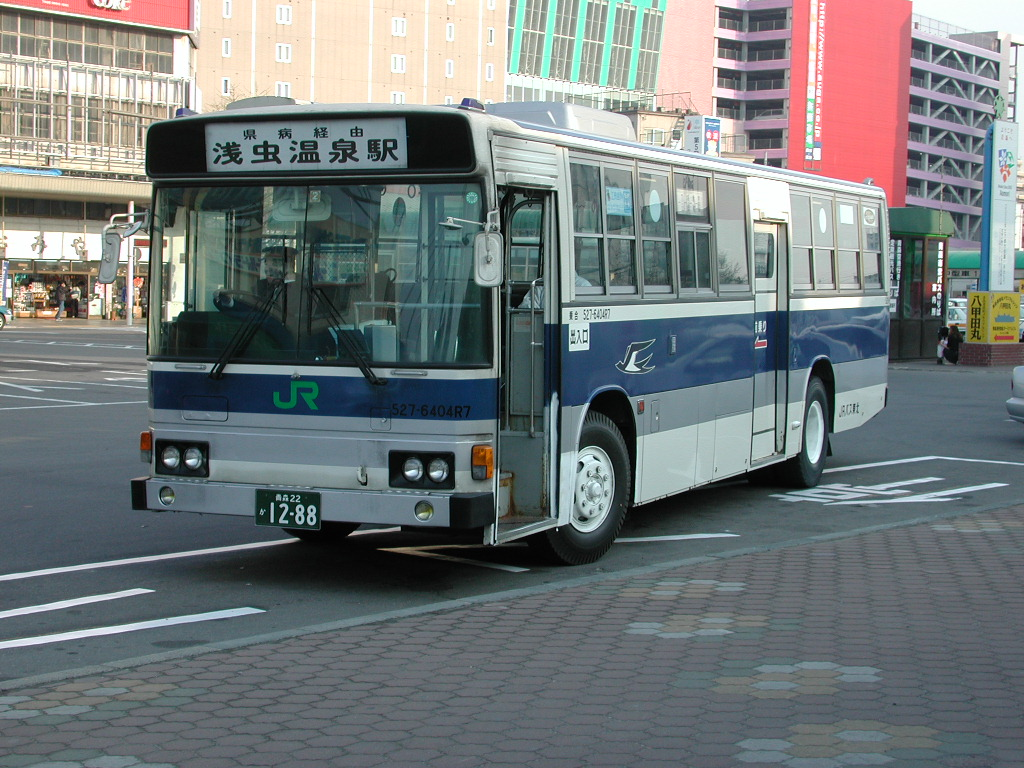 浅虫線 青森駅前にて撮影